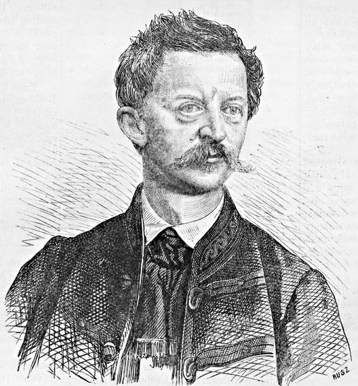 Greguss Ágost (1825–1882) író, esztéta, kritikus, egyetemi tanár, akadémikus portréja. Rusz Károly metszete